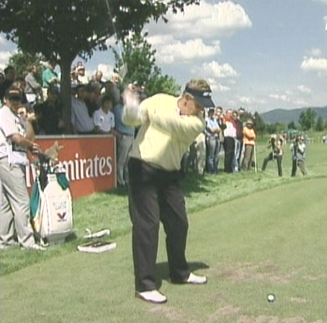 Bildbeschreibung: Colin Montgomerie bei den Austrian Open 2006 Quelle: eigene Aufnahme mit einer Handycam Fotograf/Zeichner: Boss 12:50, 29 June 2006 (UTC) Datum: 9.6.2006 Sonstiges: GNU